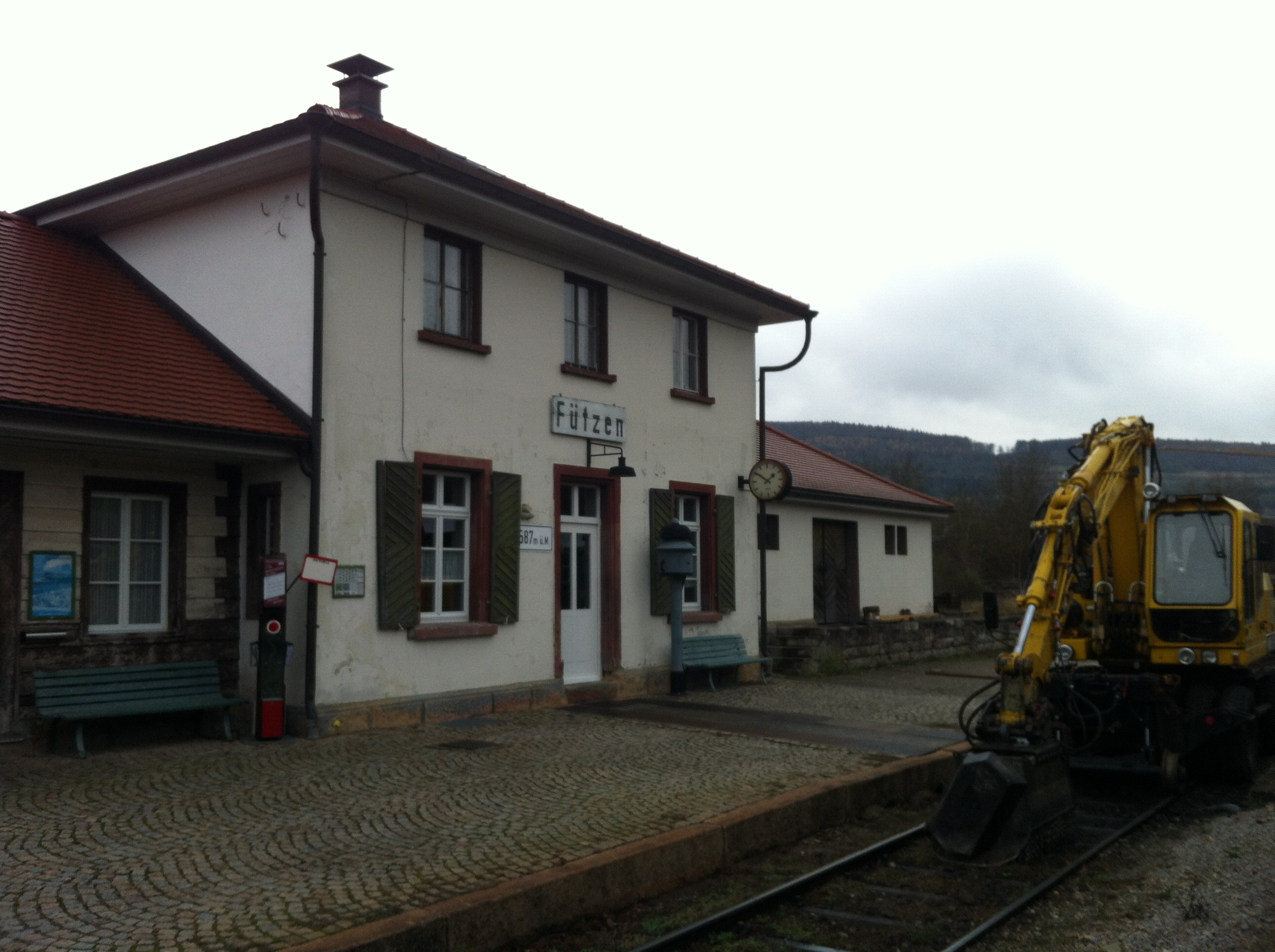 Rathaus in Fützen, Ortsteil von Blumberg, Stadt im Schwarzwald-Baar-Kreis in Baden-Württemberg. Bahnhof Wutachtalbahn (Museumsbahn).